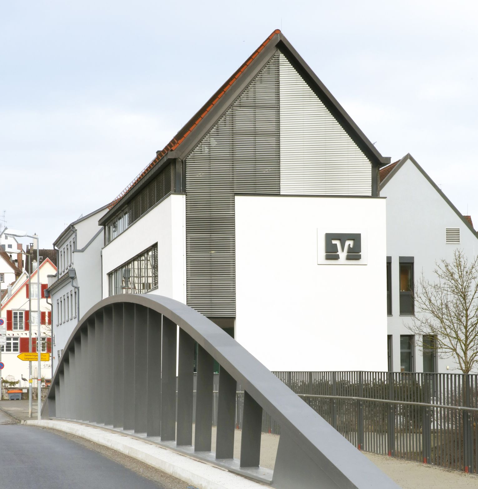 Hauptstelle der Volksbank-Raiffeisenbank Riedlingen eG